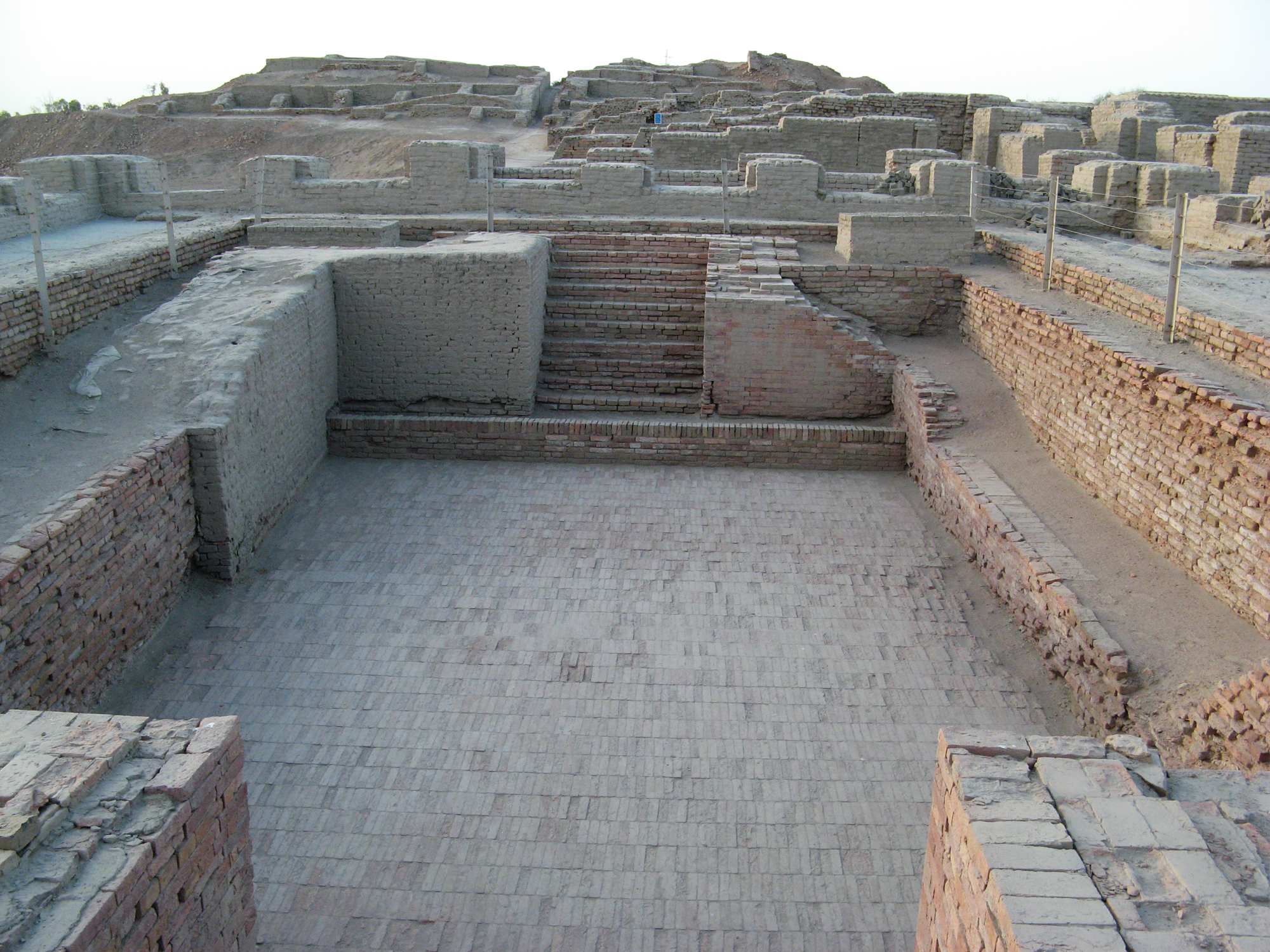 Mohenjo-daro, Pakistan